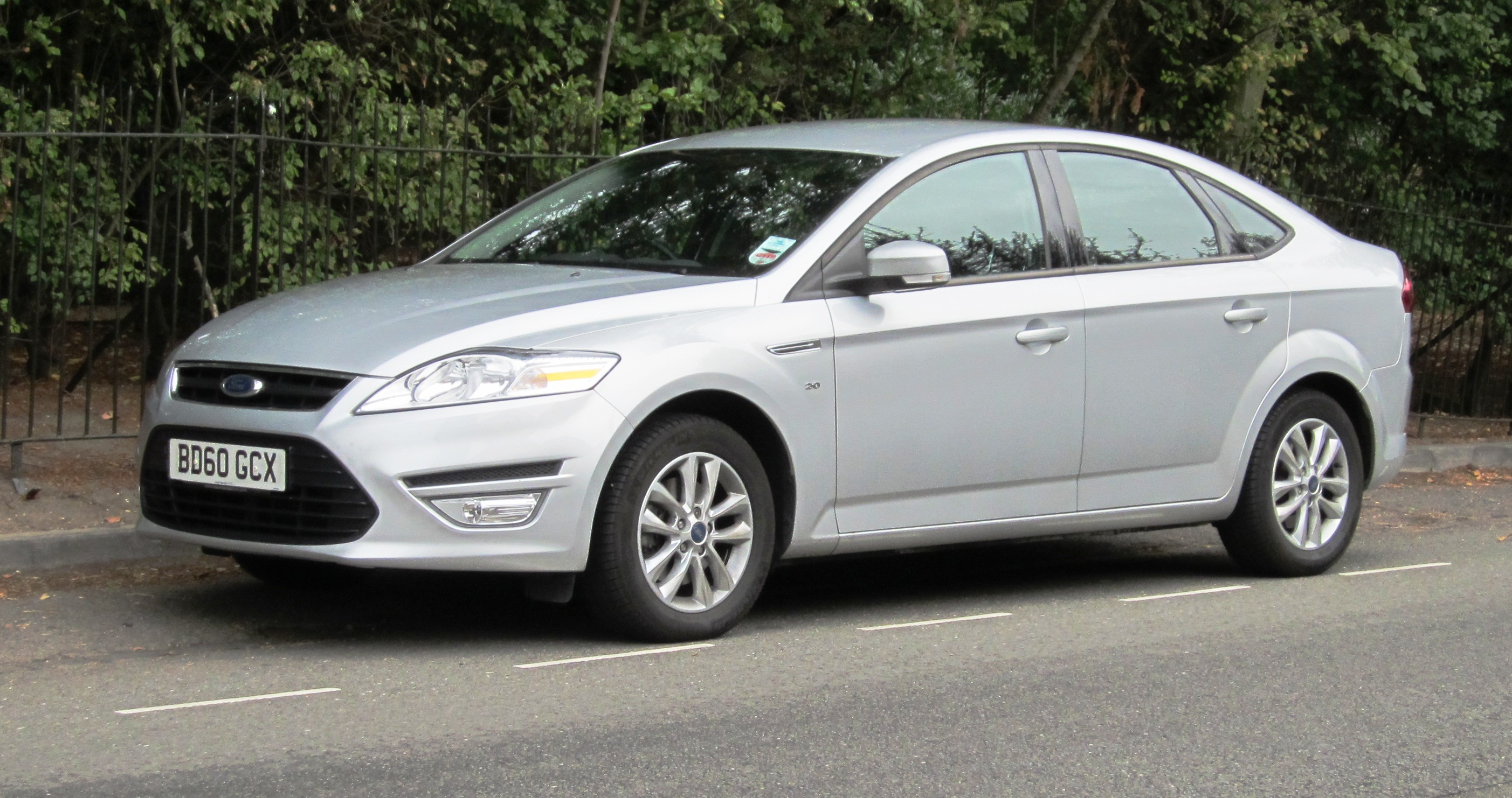 Ford Mondeo Diesel immat 2010 a Cambridge